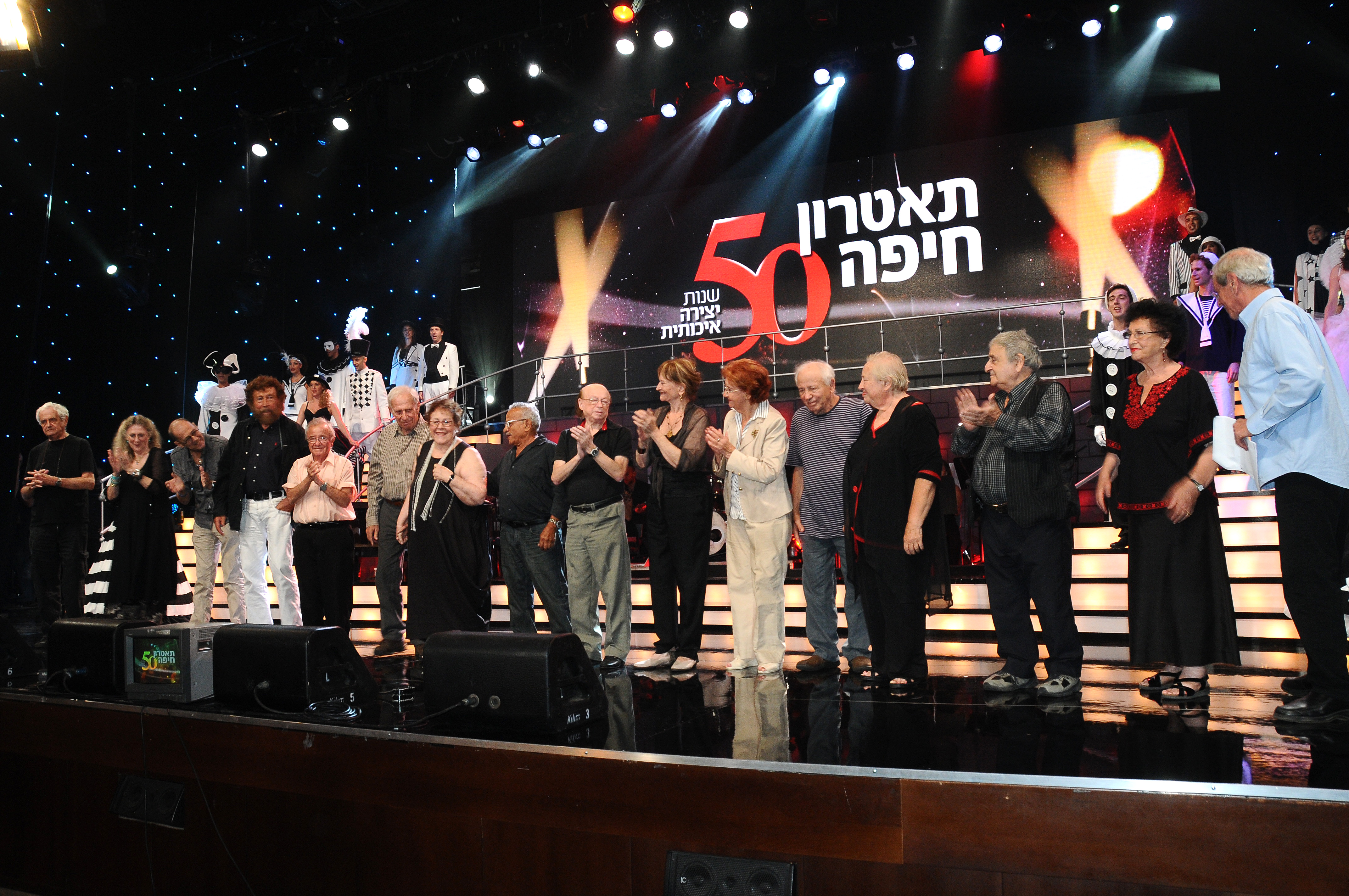 Haifa Theatre established in 1961 The pictures were given to Commons by Haifa Theatre ` תיאטרון חיפה הוקם בשנת 1961. הוא התיאטרון העירוני של העיר חיפה, והתיאטרון העירוני הראשון בישראל. התיאטרון הוקם ביוזמתו של אבא חושי ראש עיריית חיפה התמונות נמסרו להעלאה לויקיפדיה באדיבות תיאטרון חיפה חגיגות היובל של התיאטרון שנחגגו בספטמבר 2011 בהשתתפות שחקני התיאטרון בעבר ובהווה. החגיגות הוקרנו בערוץ 2 בטלוויזיה Photographed by Rafi Deluya צלם רפי דלויה